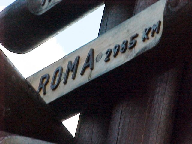 Distanza Roma-Santa Claus Village